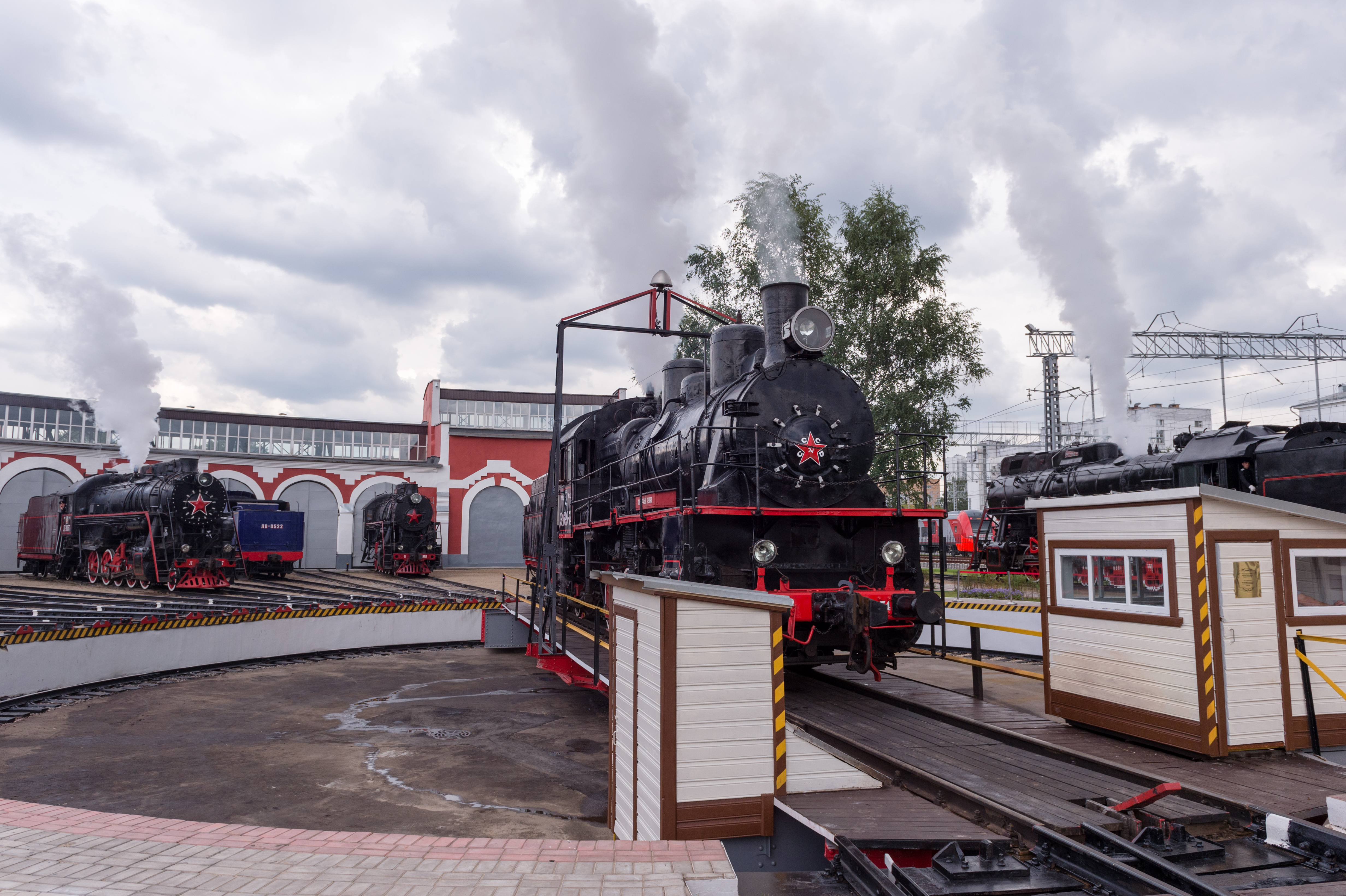 Паровоз Эу.699-74 на поворотном круге веерного депо Подмосковное. Вдали видны паровозы Л и ЛВ.